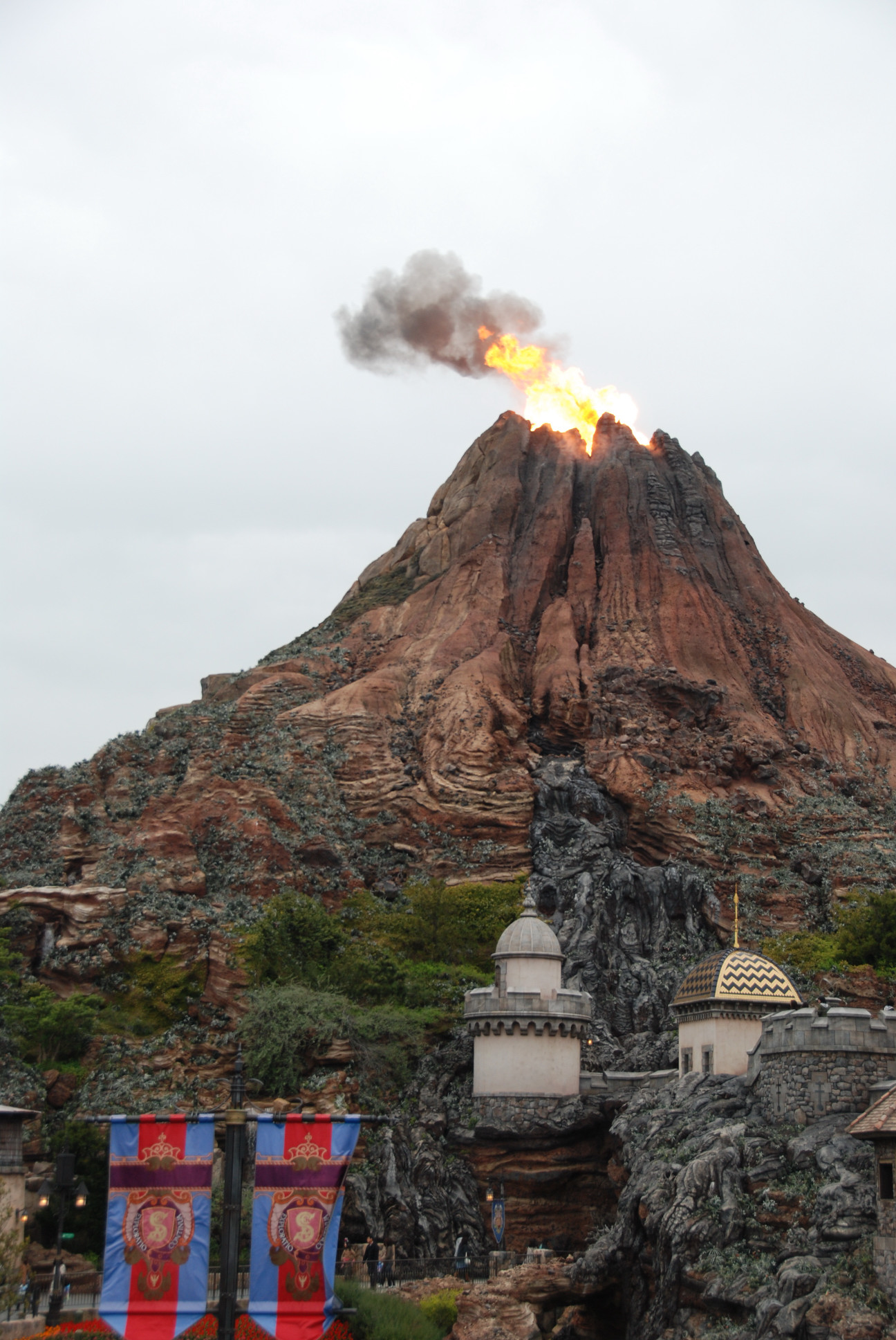 Maihama, Urayasu, Chiba Prefecture 279-0031, Japan